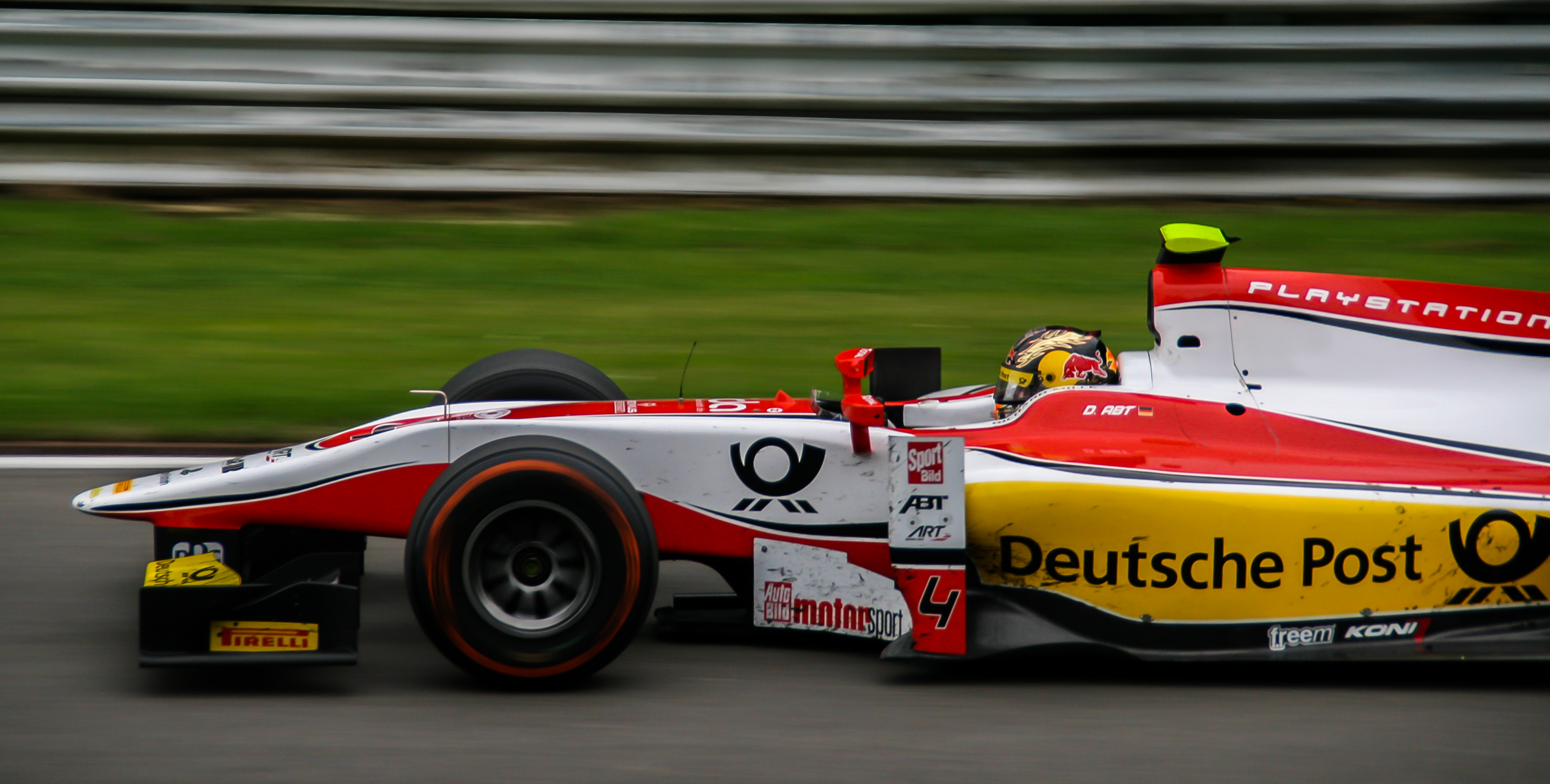 Daniel Abt beim Hauptrennen im Belgien 2013